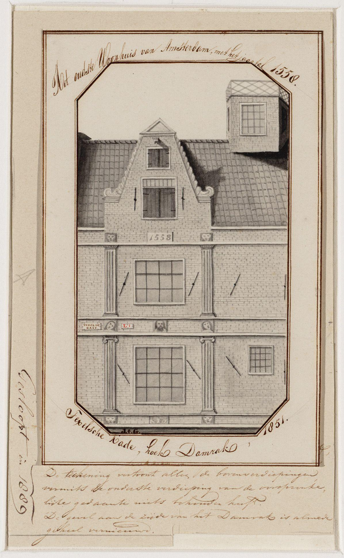 Het oudste Woonhuis van Amsterdam, met het jaartal 1558 Zijgevel van Damrak 1, het Huis met het Torentje, Texelse Kade, later: Prins Hendrikkade na nr. 47A. Het pand is gesloopt in 1889, de ornamenten van de gevel zijn opgenomen in het zogenaamde Fragmentengebouw van het Rijksmuseum. Techniek: pen in zwart en penseel in grijs.